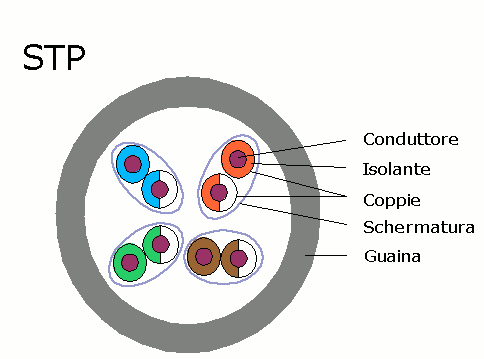 Struttura di un cavo UTP (Traduzione)